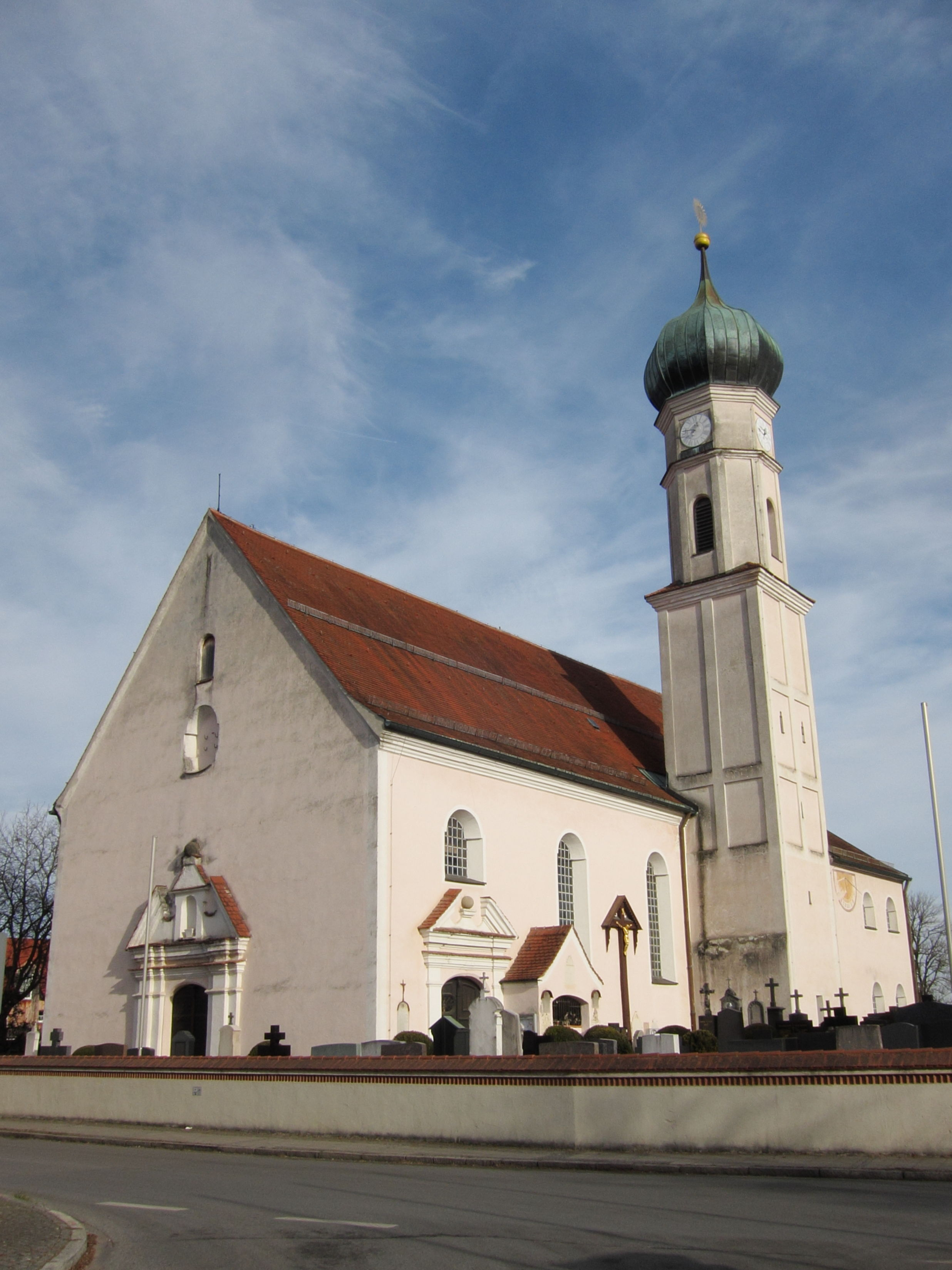 Erdinger Straße 2; kath. Pfarrkirche Mariä Geburt; barocke Anlage, 1677/81 von Jörg Zwerger erbaut; mit Ausstattung.